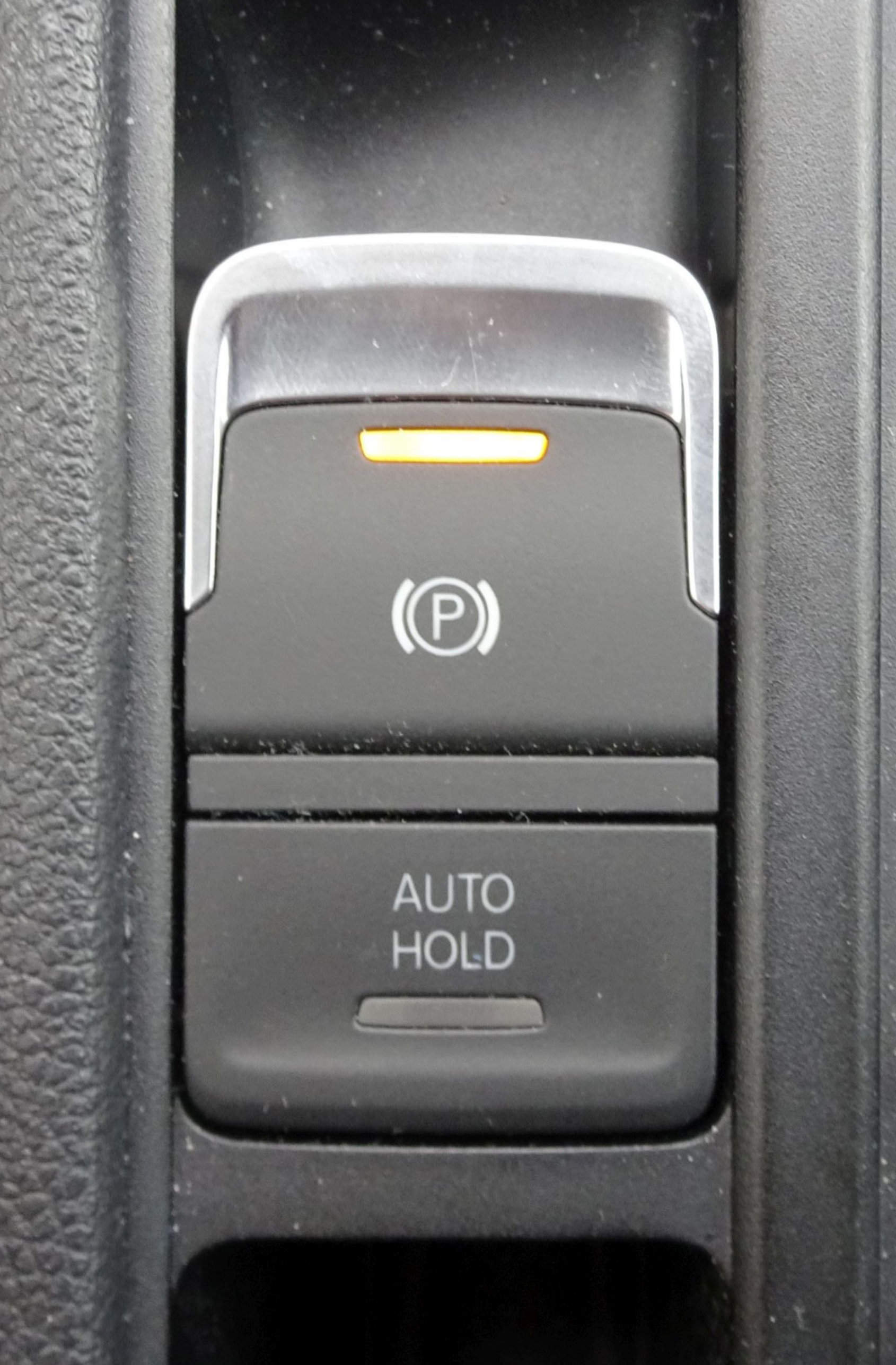 Elektrische Feststellbremse eines Touran 1.4l TSI Comfortl., Erstzulassung: 4/2016